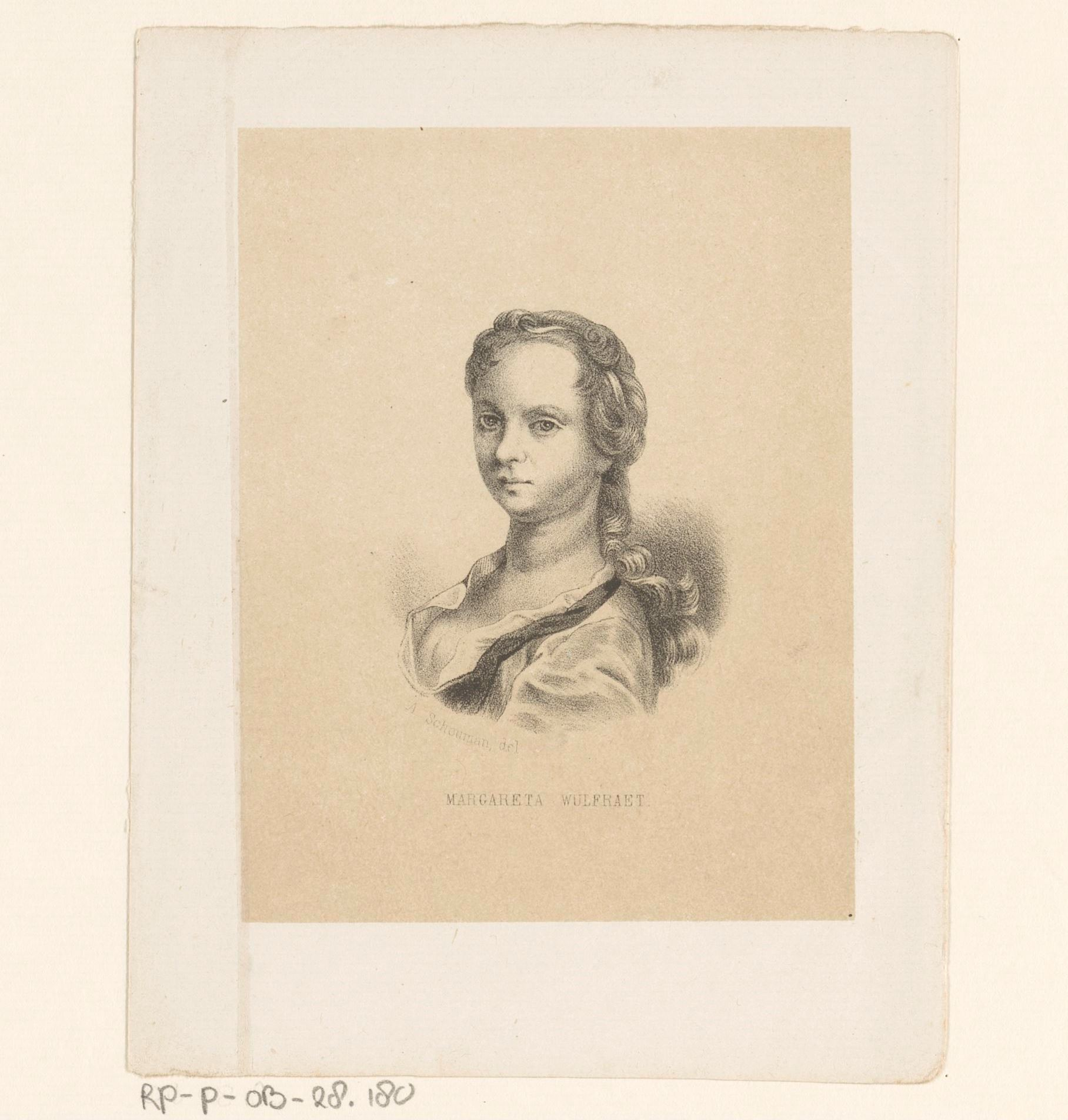 IdentificatieTitel(s): Portret van Margareta WulfraetObjecttype: prent Objectnummer: RP-P-OB-28.180Opschriften / Merken: verzamelaarsmerk, verso, gestempeld: Lugt 2228Omschrijving: De geportretteerde zit naar links gewend. Onder het portret haar naam.VervaardigingVervaardiger: prentmaker: anoniemnaar ontwerp van: Aert Schouman (vermeld op object)Datering: 1809 - 1900Fysieke kenmerken: toonlithografieMateriaal: papier Techniek: toonlithografieAfmetingen: blad: h 140 mm × b 110 mmOnderwerpWat: historical persons (+ (full) bust portrait)Wie: Margaretha WulfraetVerwerving en rechtenVerwerving: onbekend 2006Copyright: Publiek domein